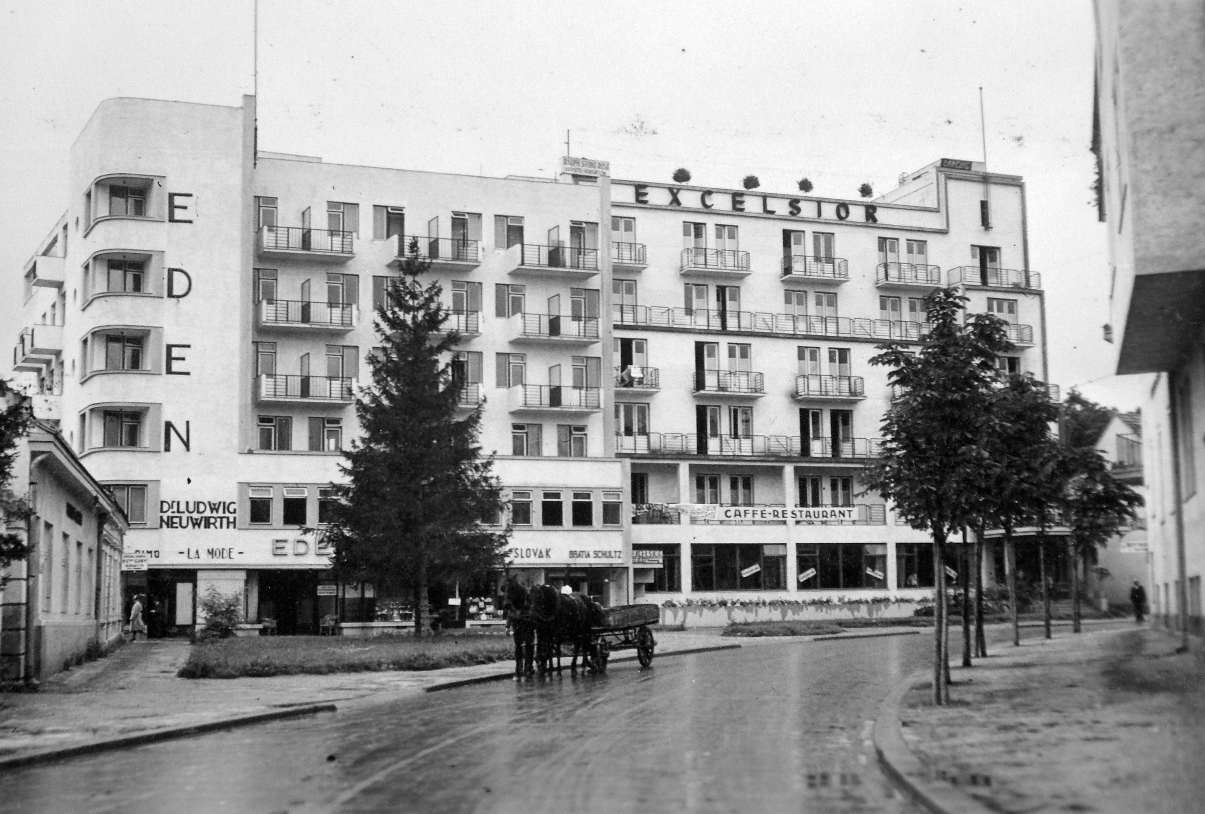 Eden és Excelsior (jelenleg Jalta) szállók. Location: Slovakia, Piestany Tags: Czechoslovakia, street view, coach, Horse-drawn carriage, hospitality, hotel Title: Eden és Excelsior (jelenleg Jalta) szállók.